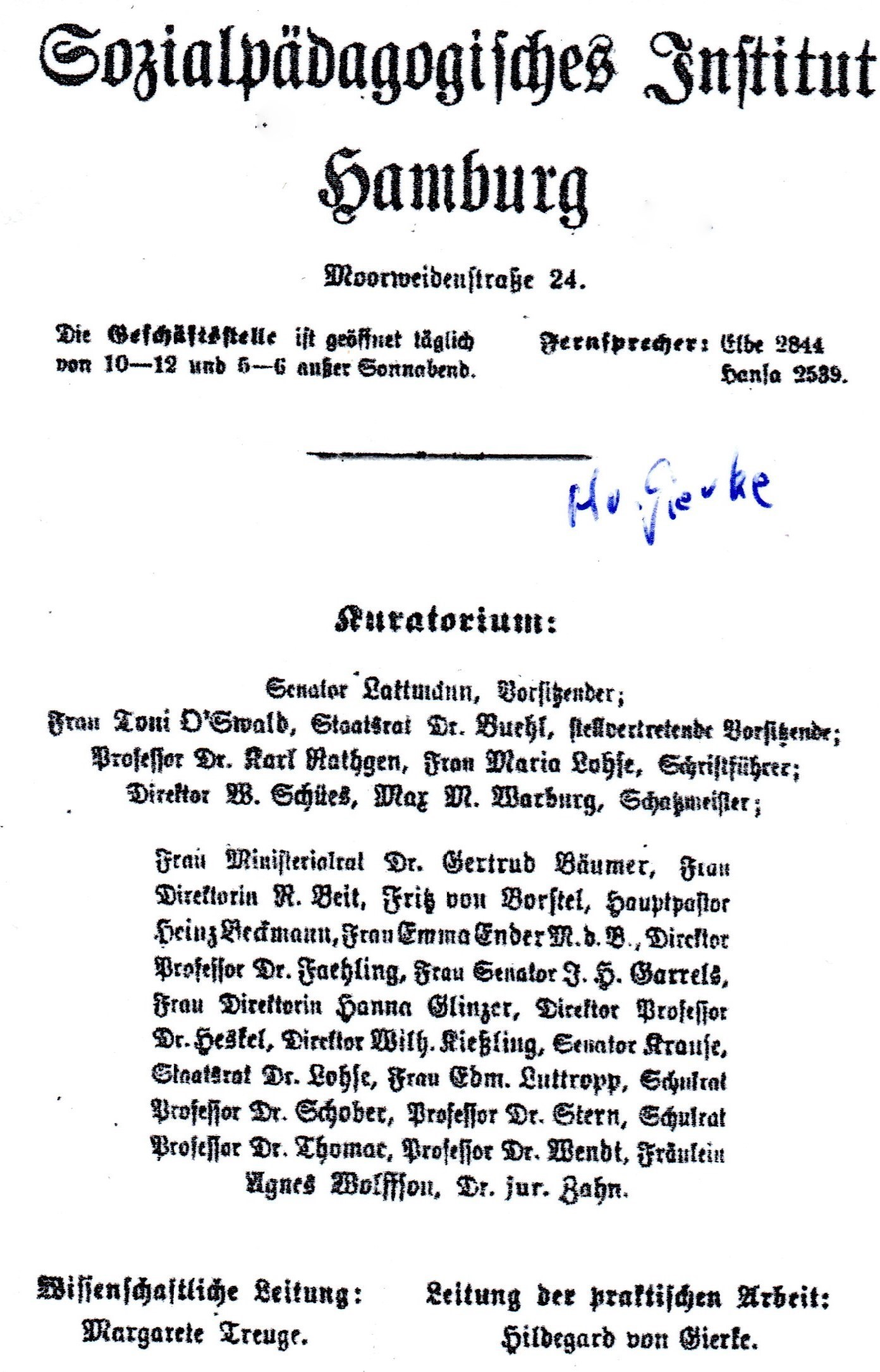 Schulprosepkt